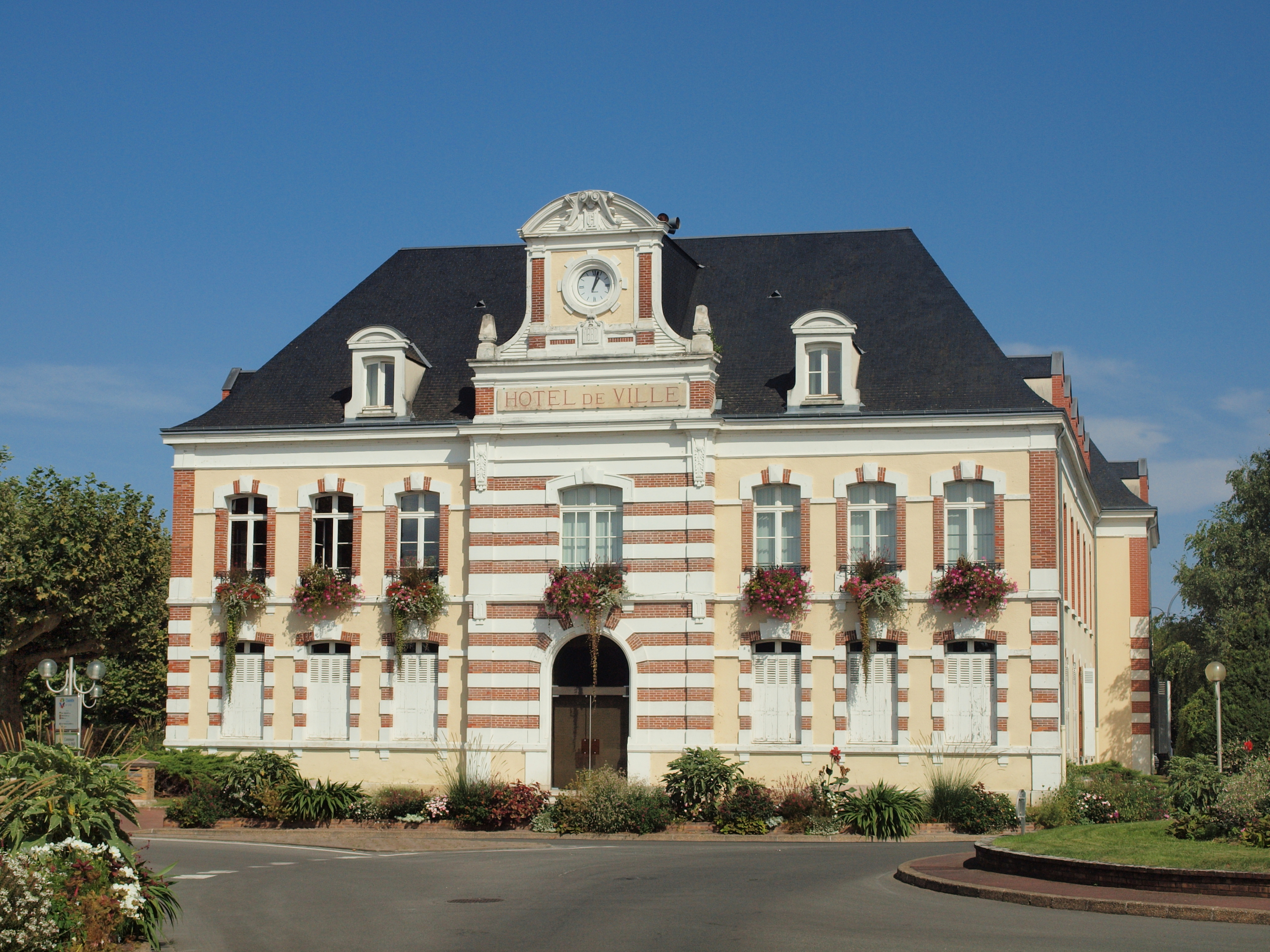 Hôtel de ville de Châlette-sur-Loing (Loiret, France)